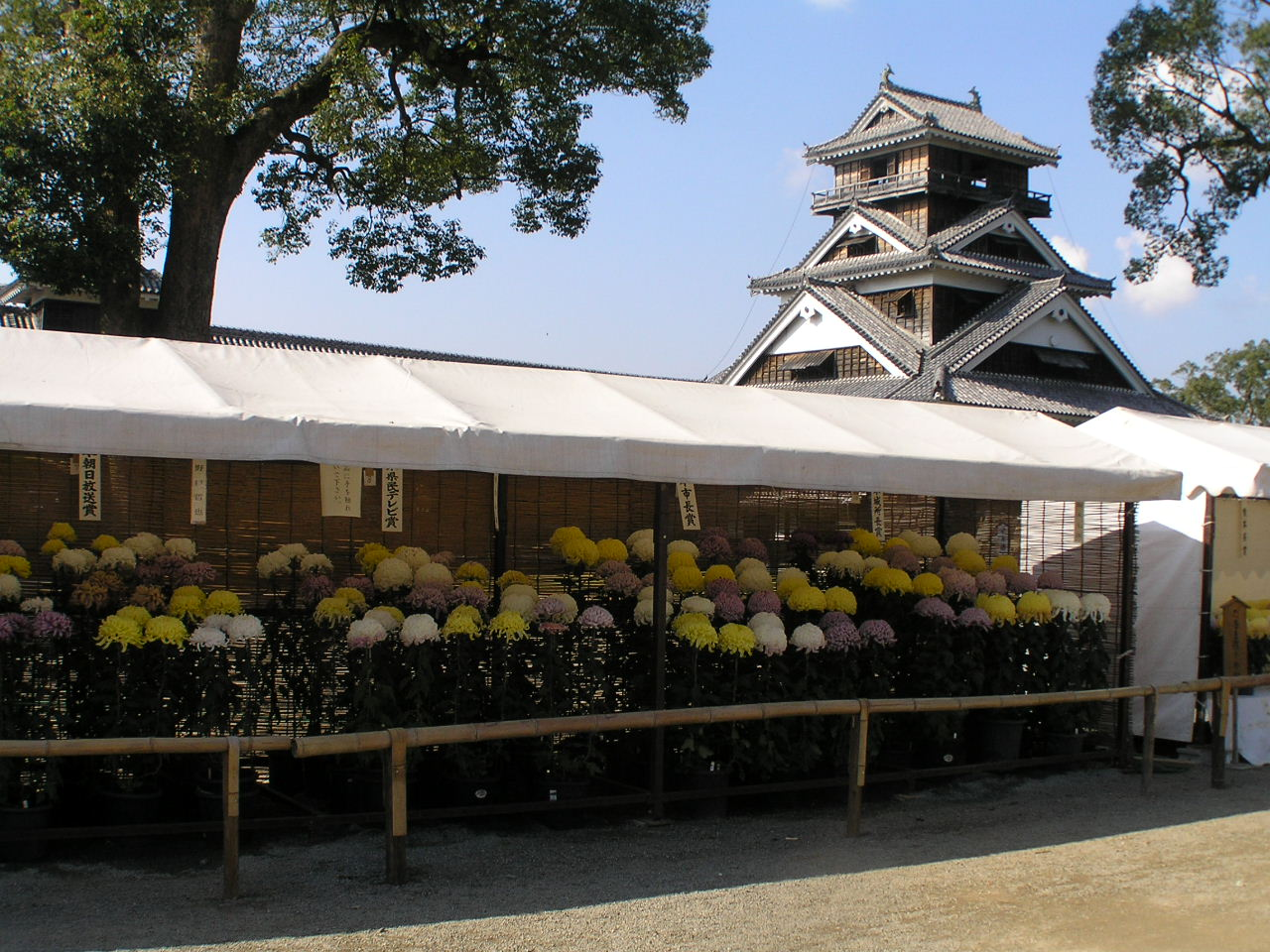 2004-11-08 Kumamoto Castle 熊本城